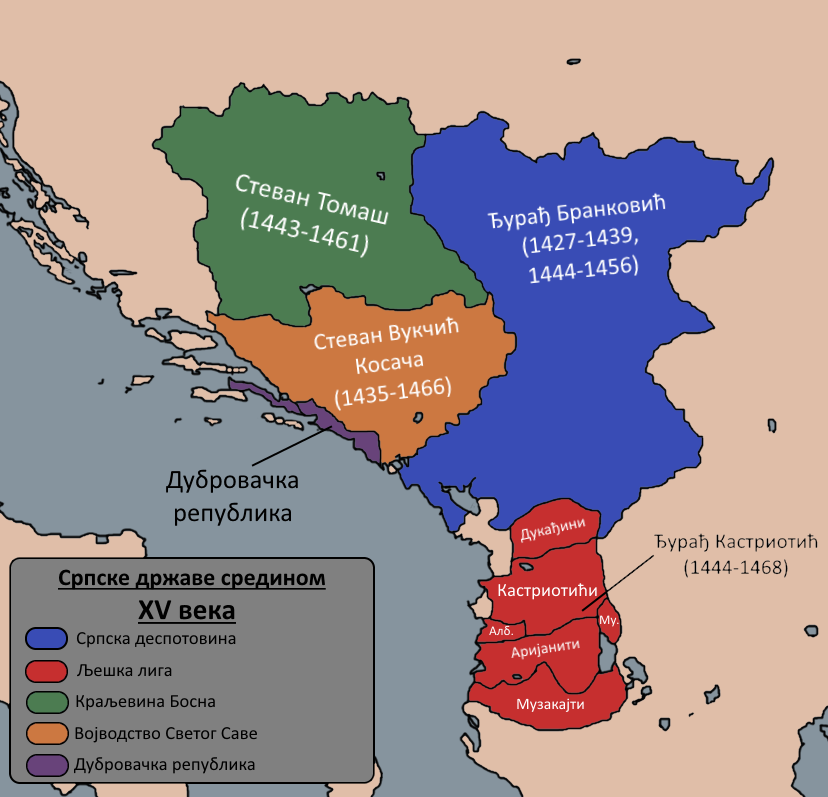 Srpski (latinica): Karta koja prikazuje srpske države sredinom 15. veka. NAPOMENA: Nisu svi velikaši iz Lješke lige bili Srbi. Lješka liga je stavljena zbog njenog predvodnika, Đurađa Kastriotića Skender-bega, koji je bio Srbin.